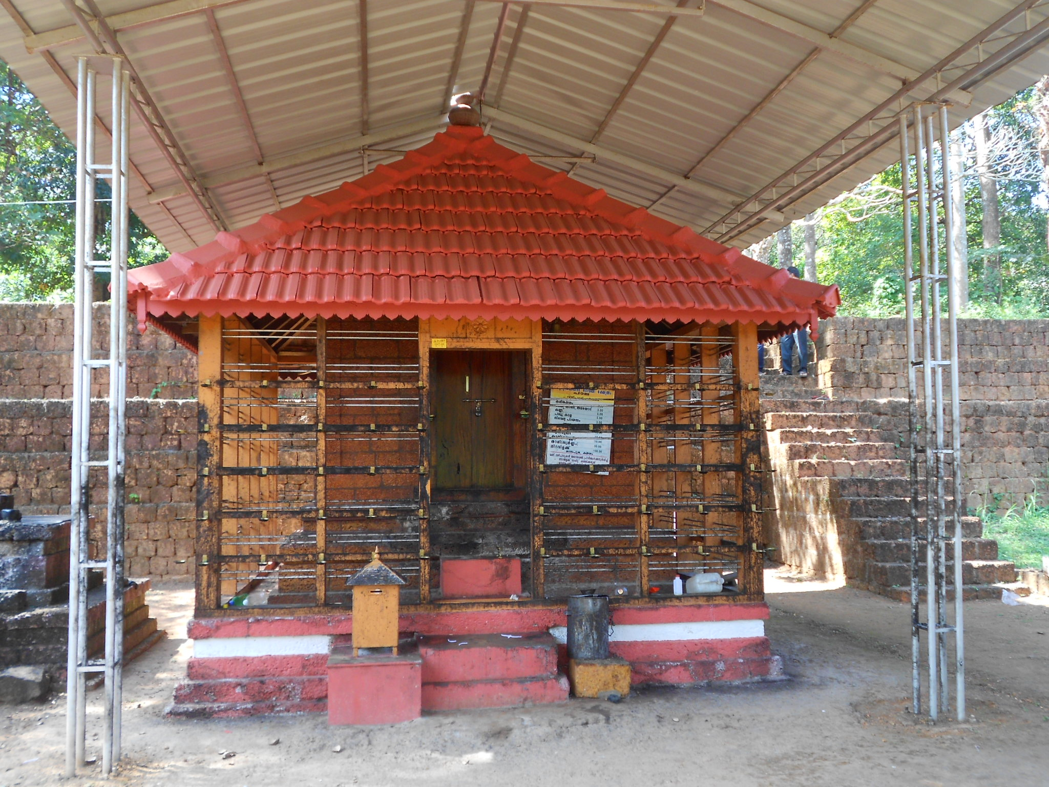 മുഴക്കുന്ന് ഭഗവതി ക്ഷേത്രം